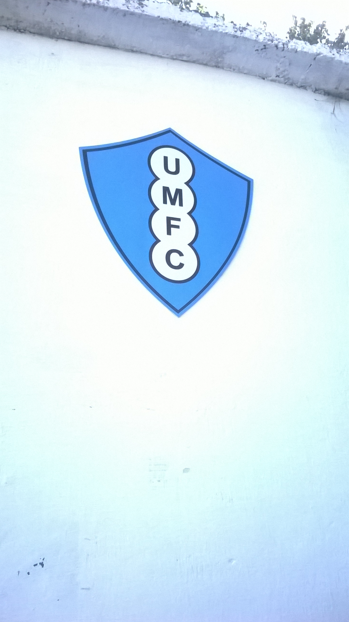 Escudo de Uruguay Montevideo en el Parque Ancap